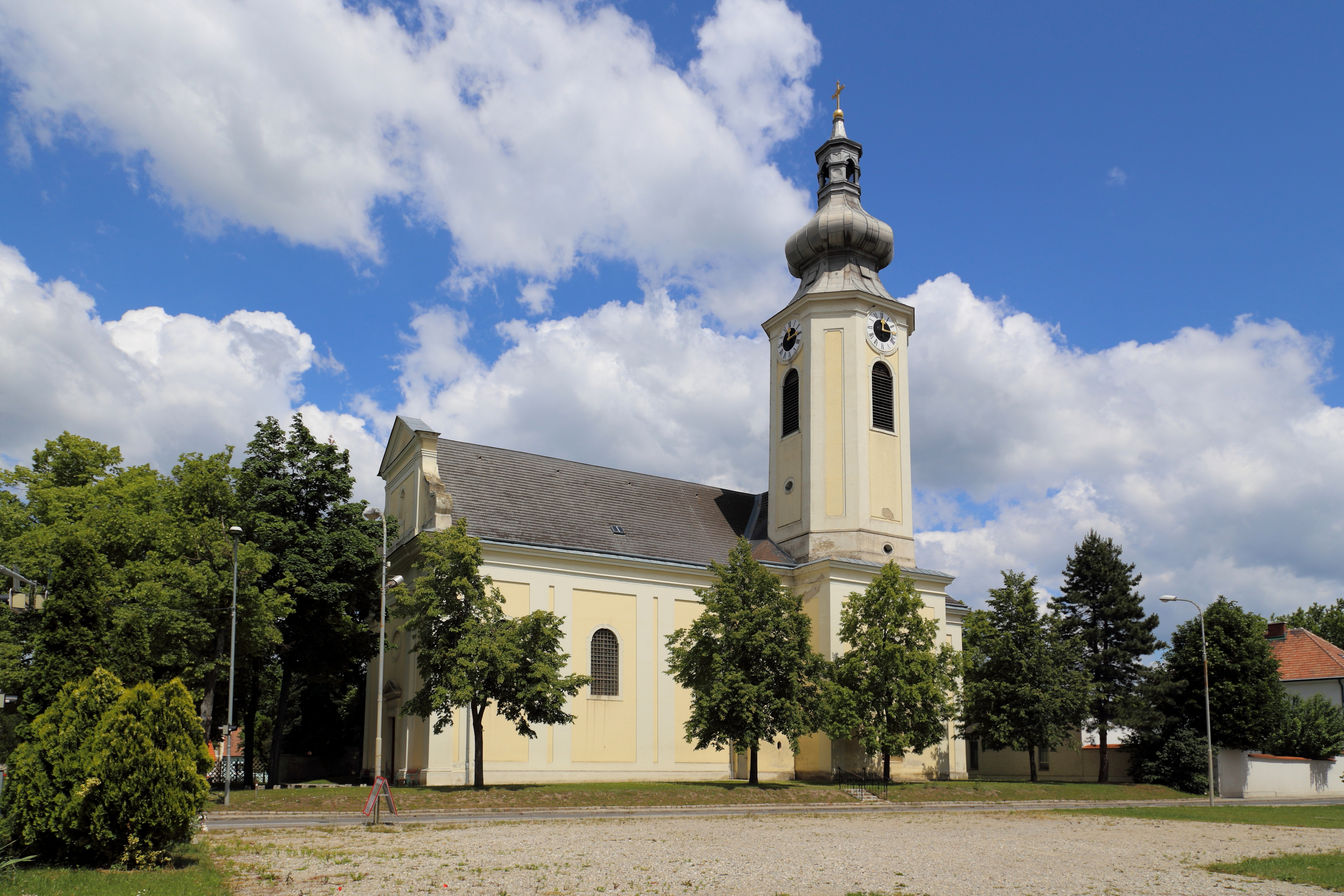 Südansicht der Pfarrkirche Mariae Himmelfahrt in der niederösterreichischen Marktgemeinde Obersiebenbrunn. Dieser großer einheitlicher Barockbau mit einem mächtigen Südturm wurde von 1722 bis 1724 in der Angermitte errichtet.